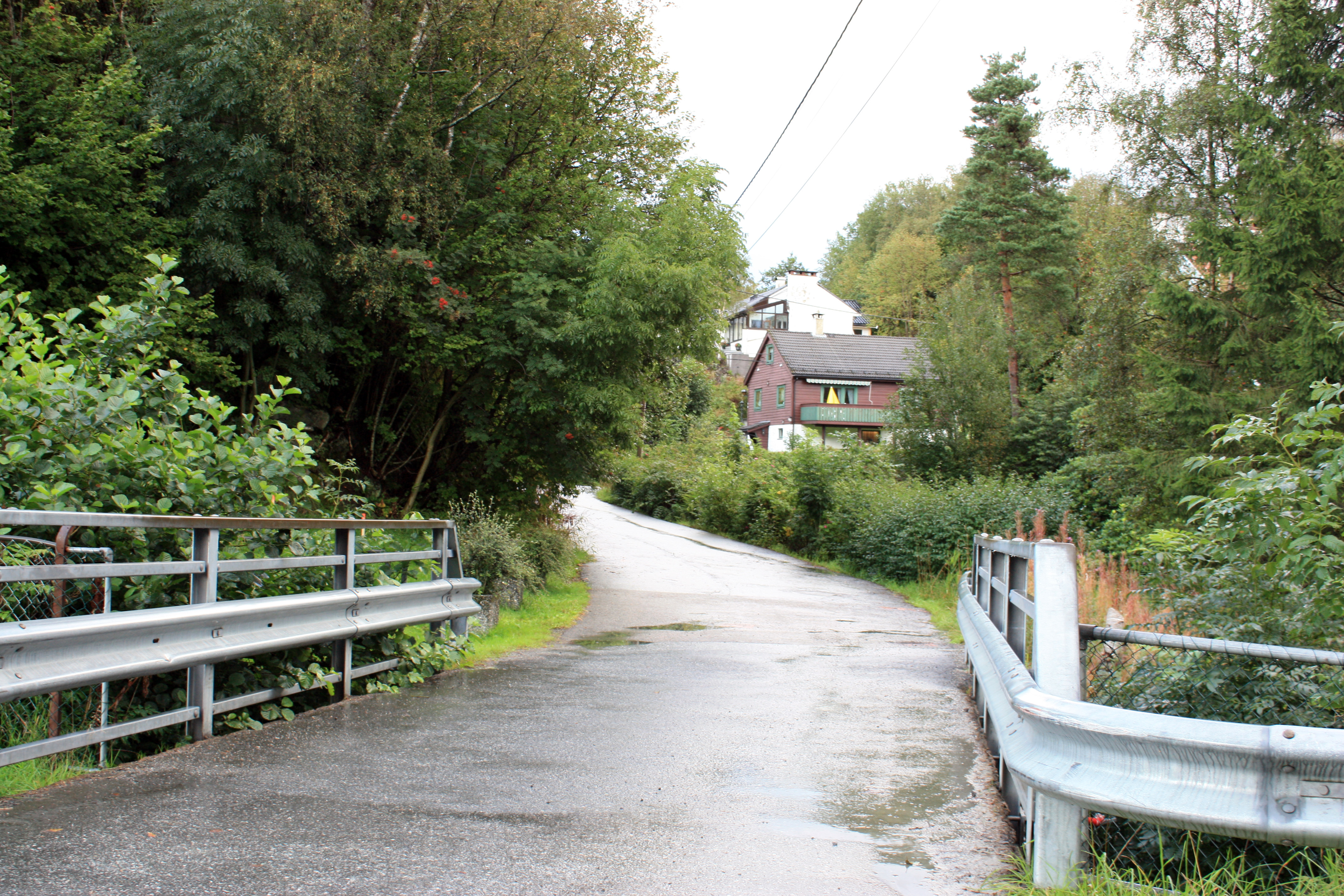 Harevegen, Fana, Bergen.